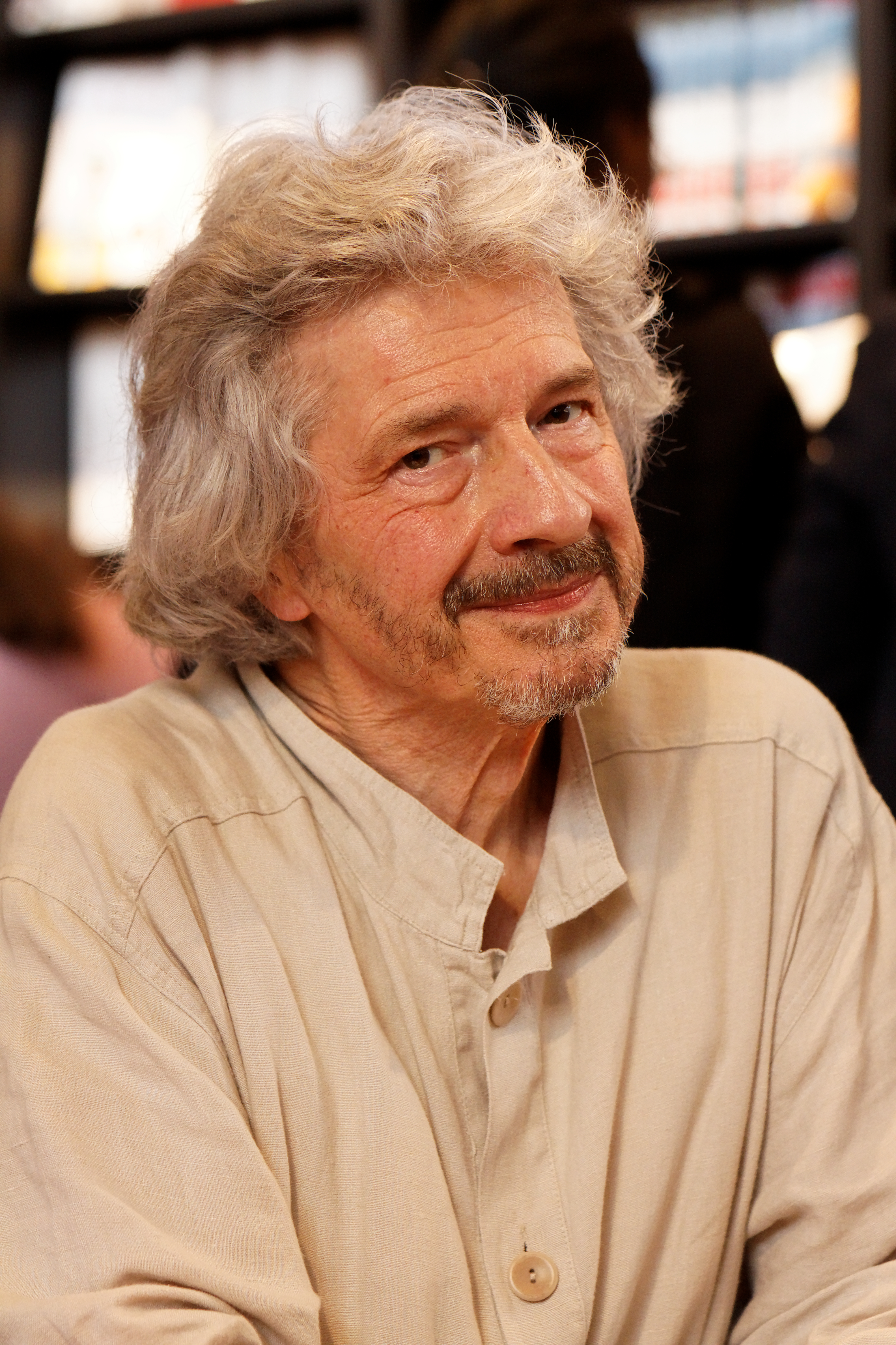 Michel Rostain lors du salon du livre de Paris 2011.